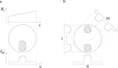 Slikanje z magnetno resonanco. Avtor Primož Peterlin. (briši) (tren) 13:06, 10 oktober 2003 . . Peterlin (Pogovor) . . 405x235 (8956 zlogov)